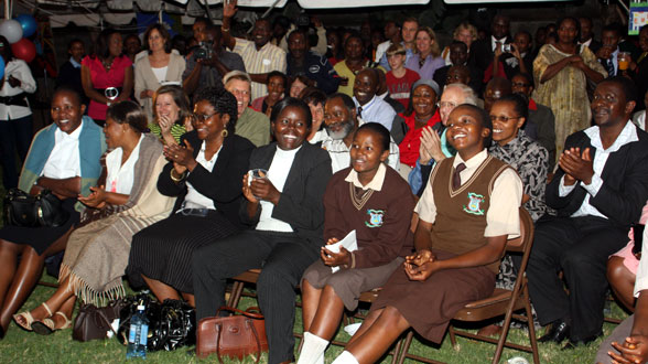 Kenyans cheer President Obama's Inaugural Address, Nairobi, Kenya.